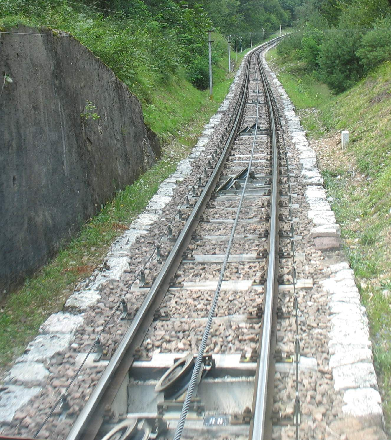 Funicolare della Mendola, particolare tracciato